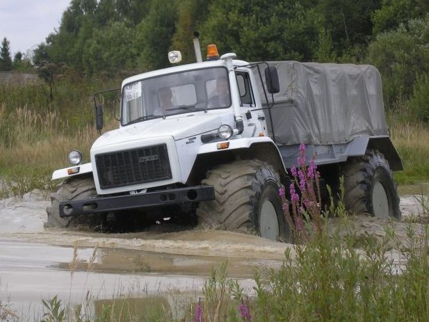 Мамонтёнок — плавающий грузовой вездеход с шарнирно-сочлененной рамой на шинах сверхнизкого давления.